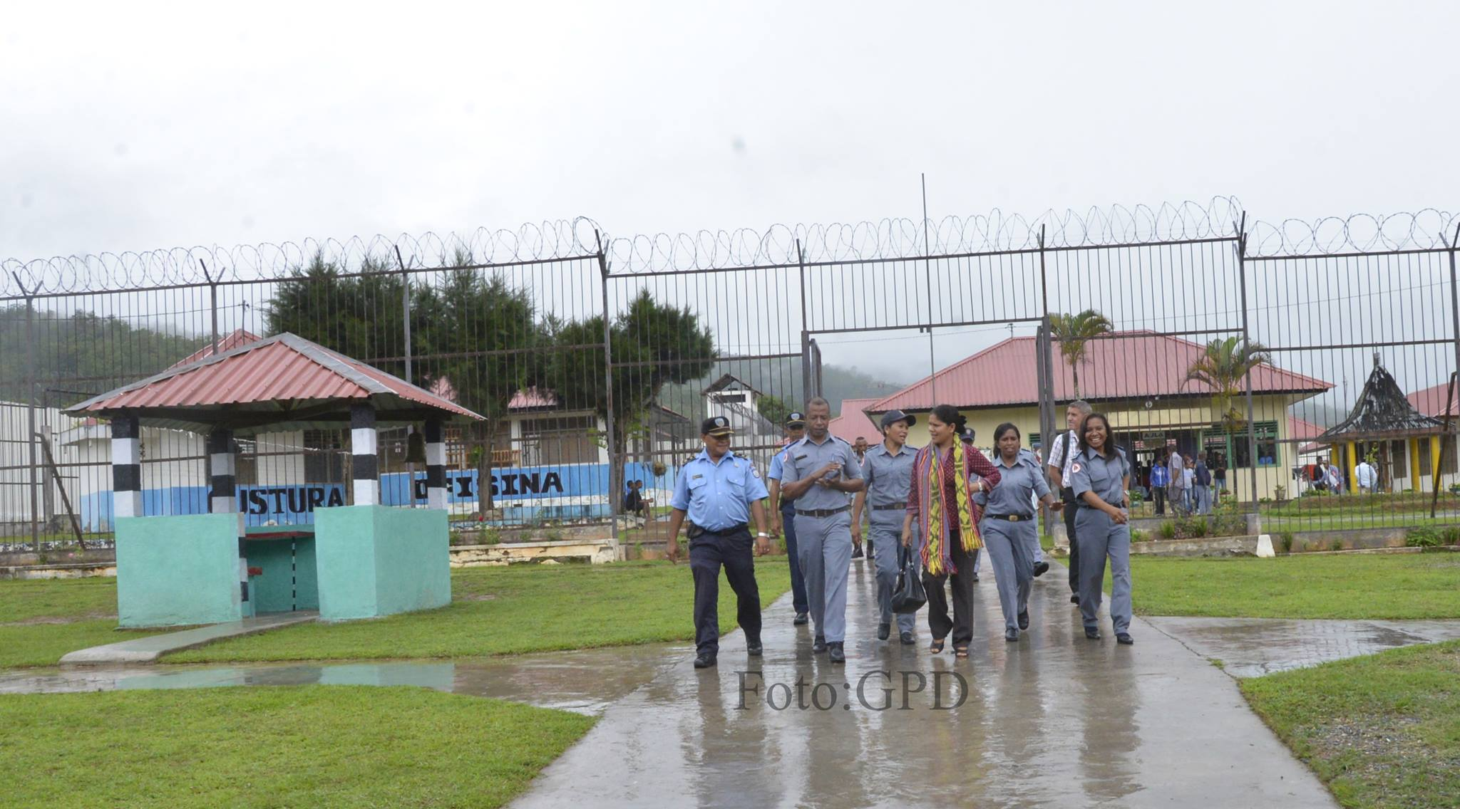 Gefängnis von Gleno, Osttimor. Wärter mit First Lady Isabel da Costa Ferreira